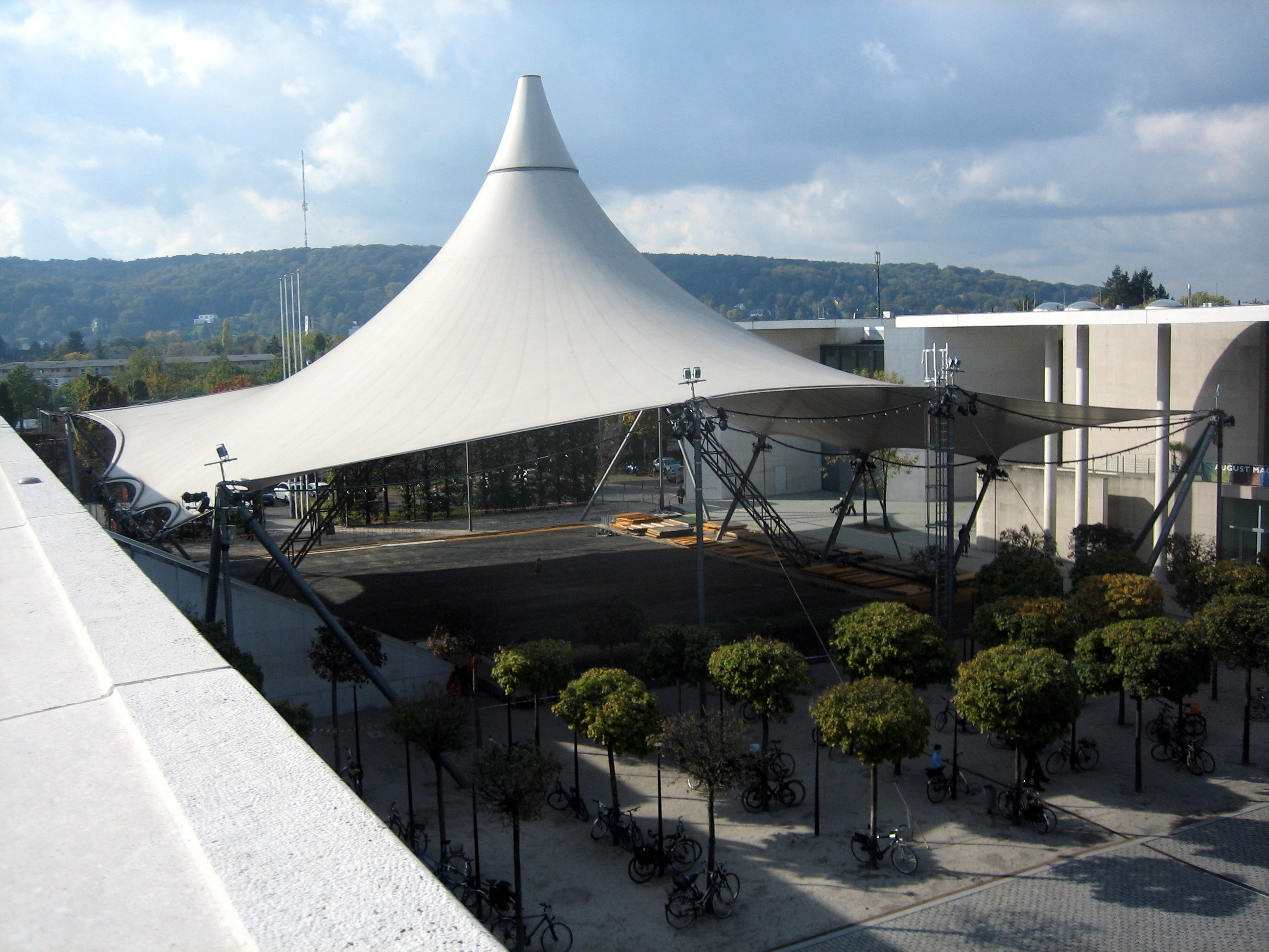 Zeltdach (2012 abgebaut) auf dem Museumsplatz an der Museumsmeile, Bonn